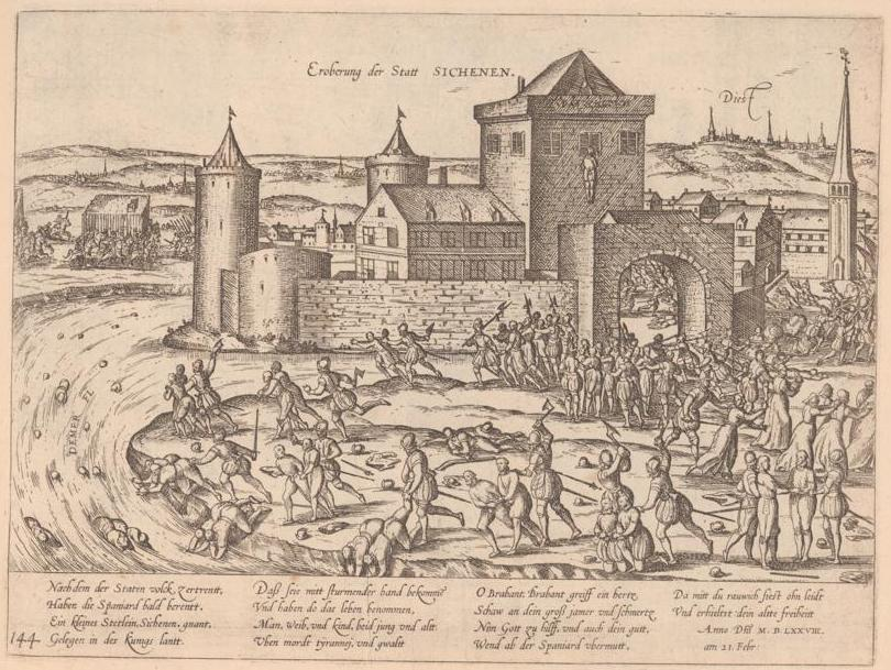 Prise de la ville de Zichem en 1578